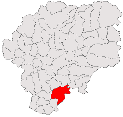 Categorie:Hărţi ale judeţului Bistriţa-Năsăud